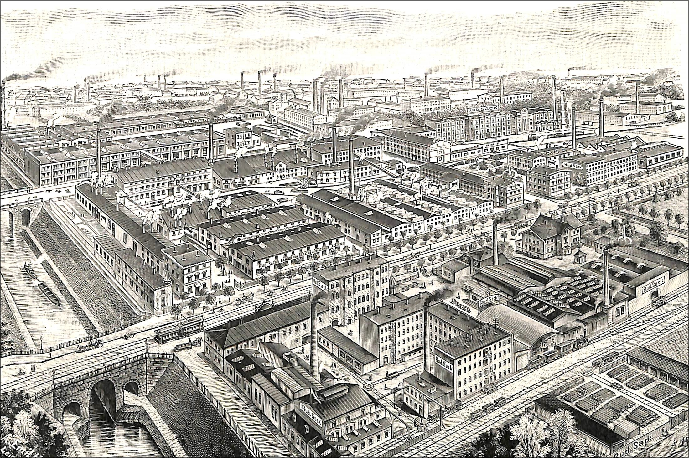 Leipzig -(fiktive) Ansicht der Landmaschinenfabrik Rudolf Sack.